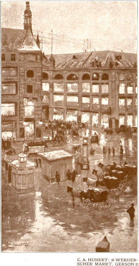 Werderscher Markt, Blick auf die nördliche Seite vor der Kirche